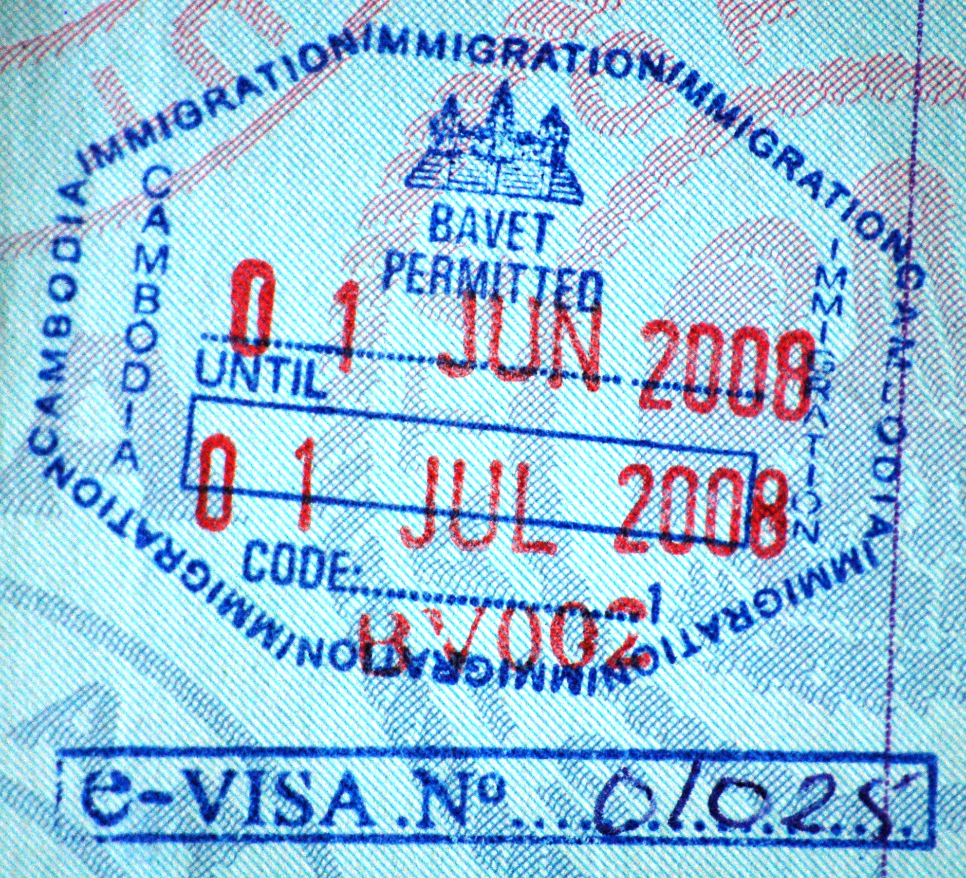 Passport entry stamp from Bavet.